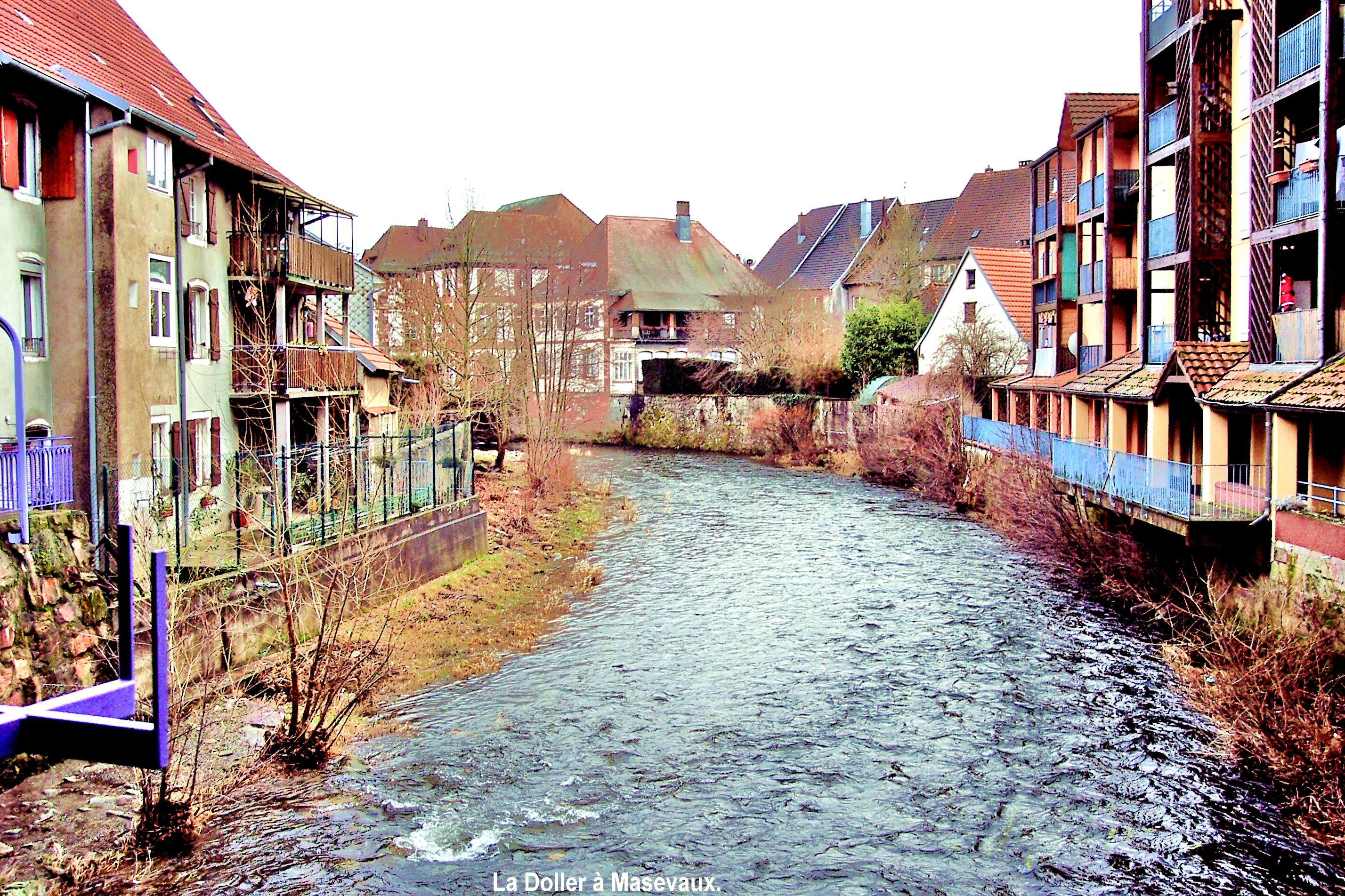 La Doller à Massevaux.